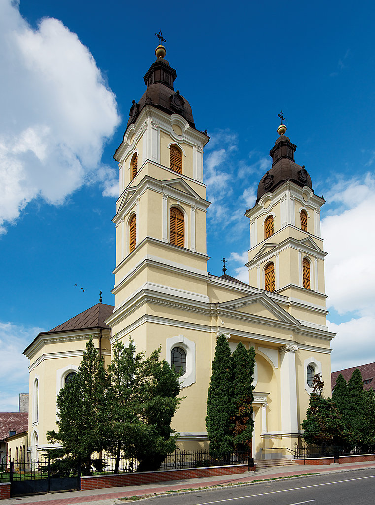 A nyíregyházi Szent Miklós Görögkatolikus Székesegyház